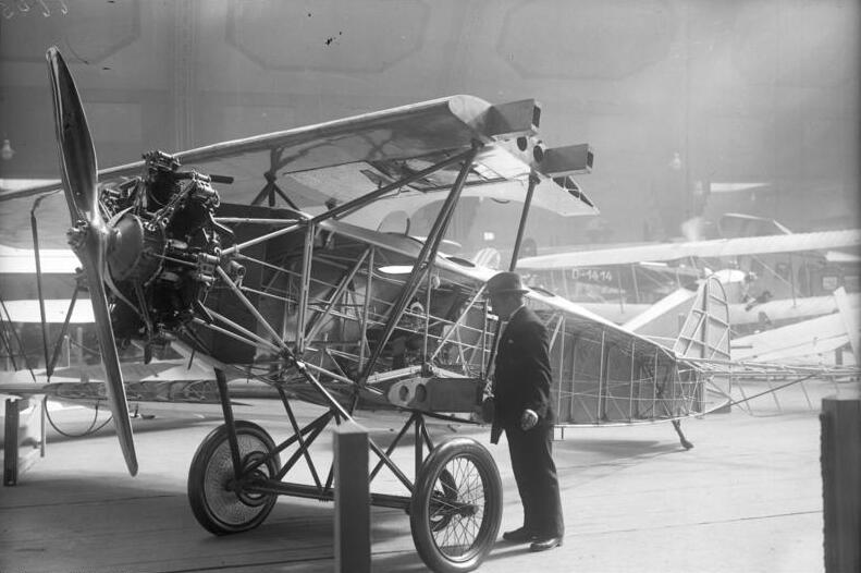 Die Eröffnung der II. Internationalen Luftfahrt -Ausstellung in den Ausstellungshallen am Kaiserdamm in Berlin1 Querschnitt eines deutschen Doppeldeckers auf der "ILA".